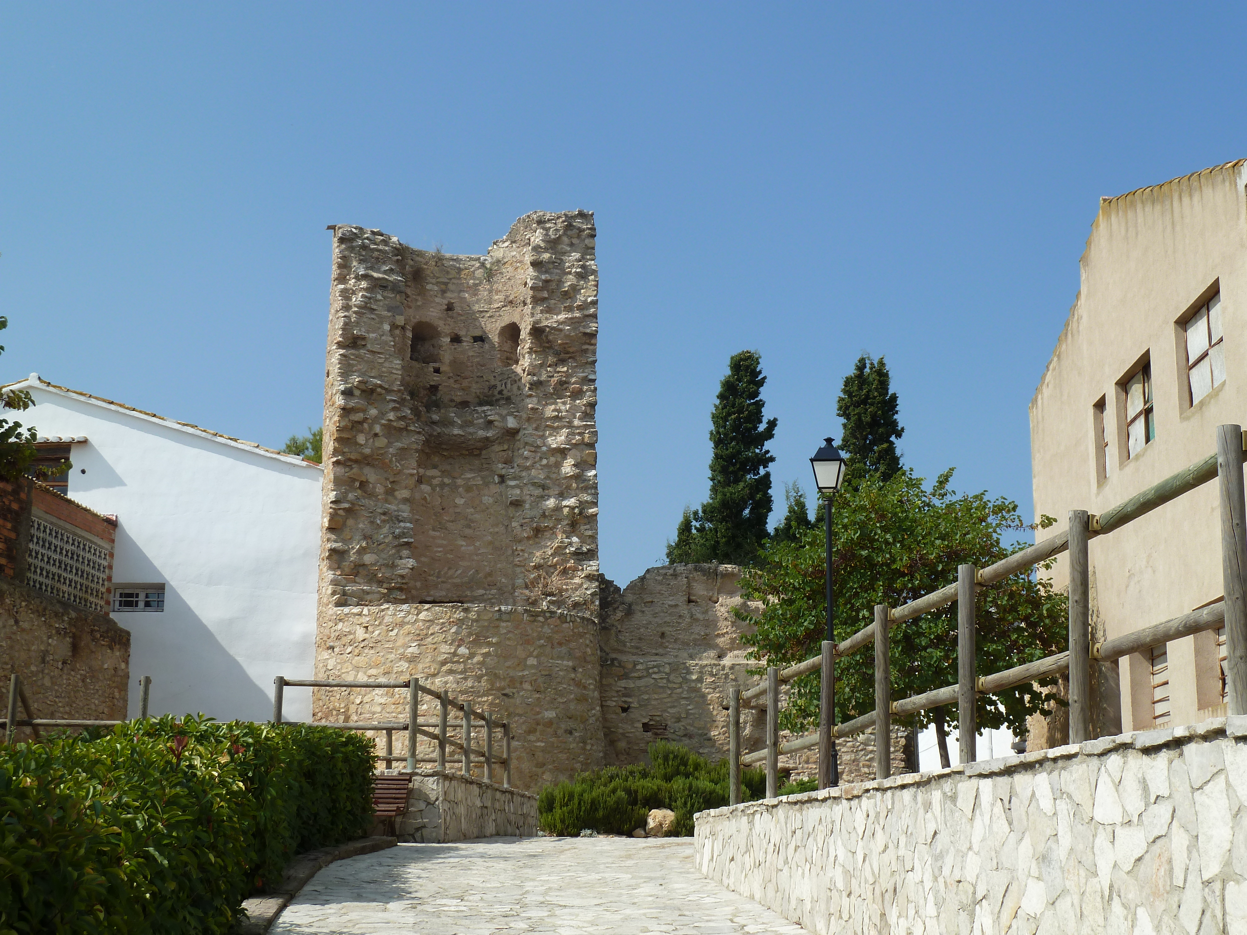 Torre de Lleger